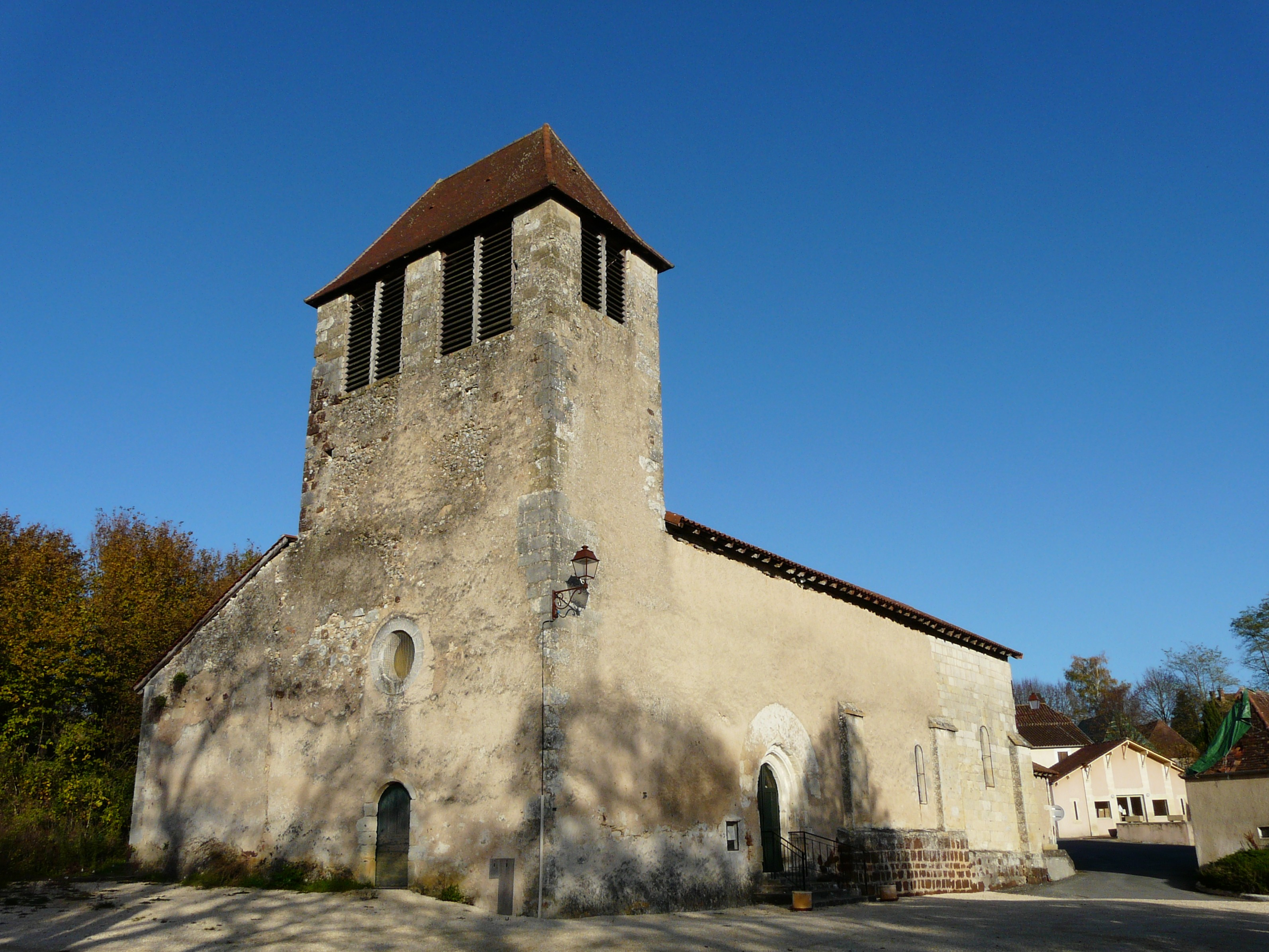 L'église Saint-Marc de Milhac-d'Auberoche, Dordogne, France.